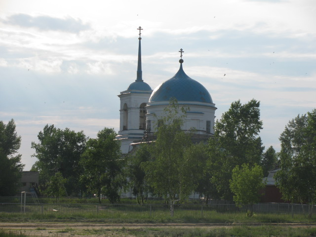 Нижняя Добринка